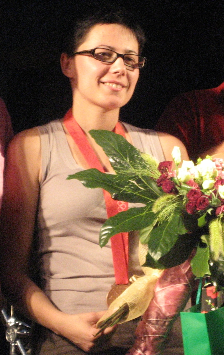 Doček Snježane Pejčić na riječkom Korzu, nakon povratka iz Pekinga